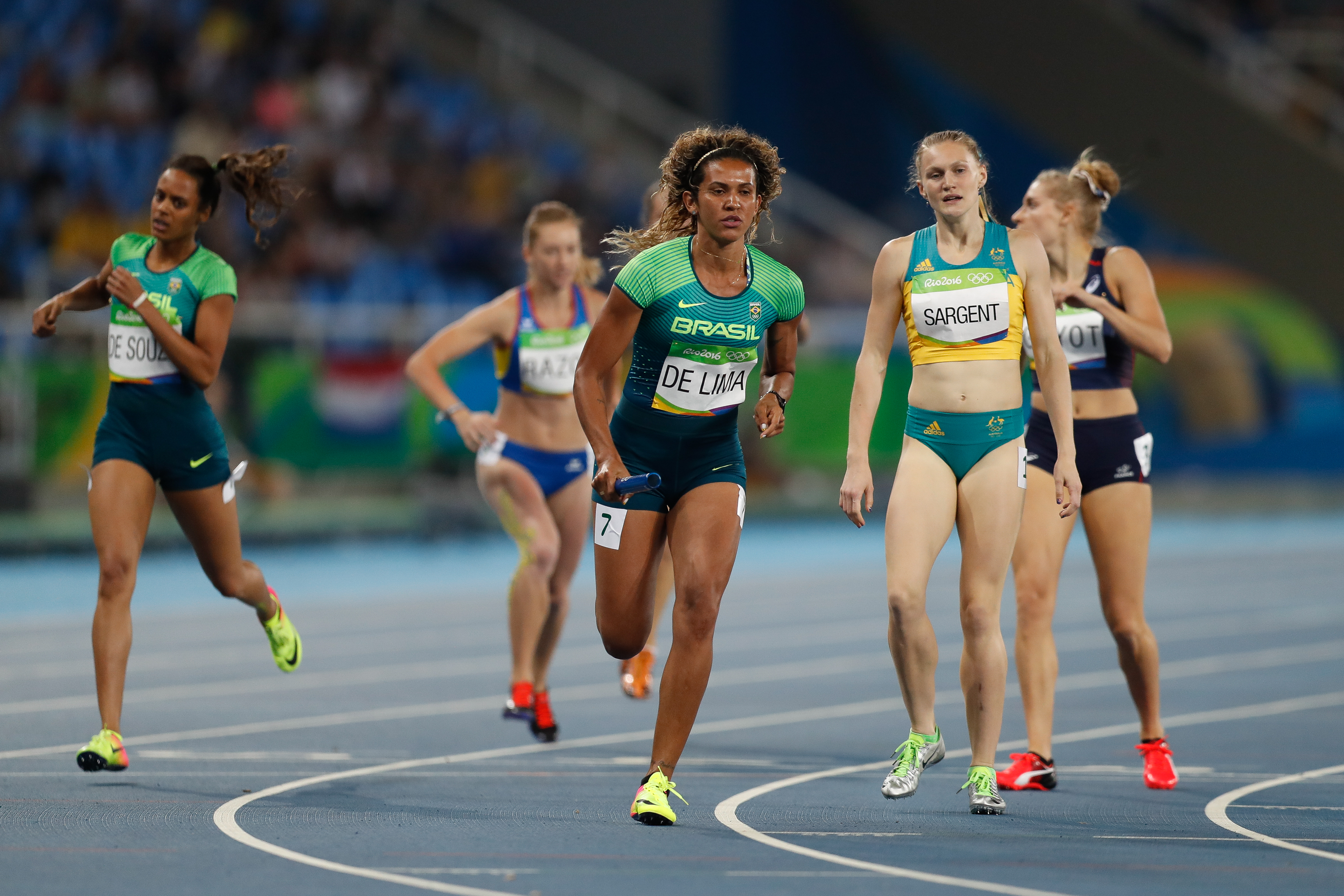 Rio de Janeiro - Eliminatórias do revezamento 4 x 400m nos Jogos Rio 2016, no Estádio Olímpico (Fernando Frazão/Agência Brasil)